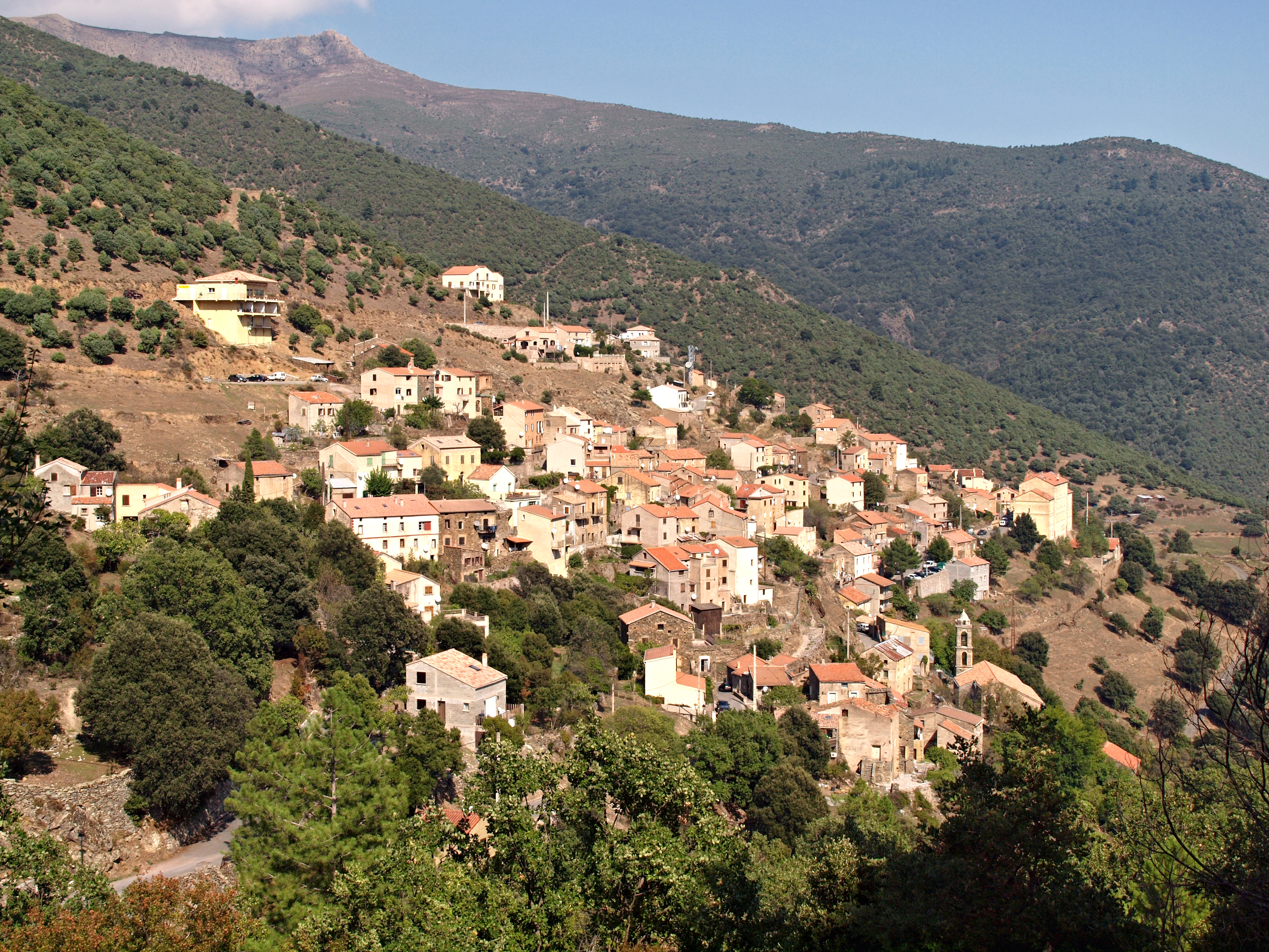 Asco - Le village